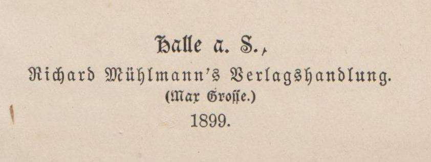 Firma Imprint Richard Mühlmann